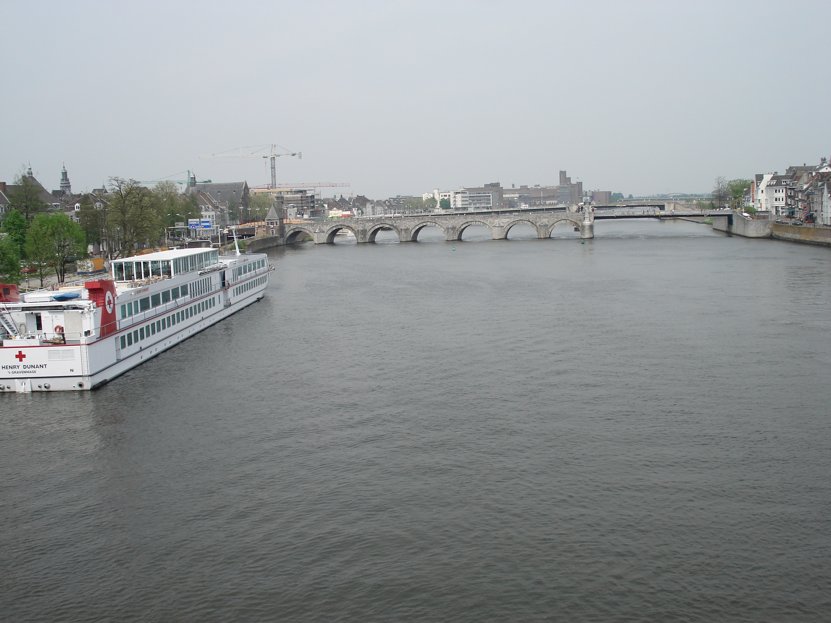 Zelf getrokken foto, skyline Maastricht.